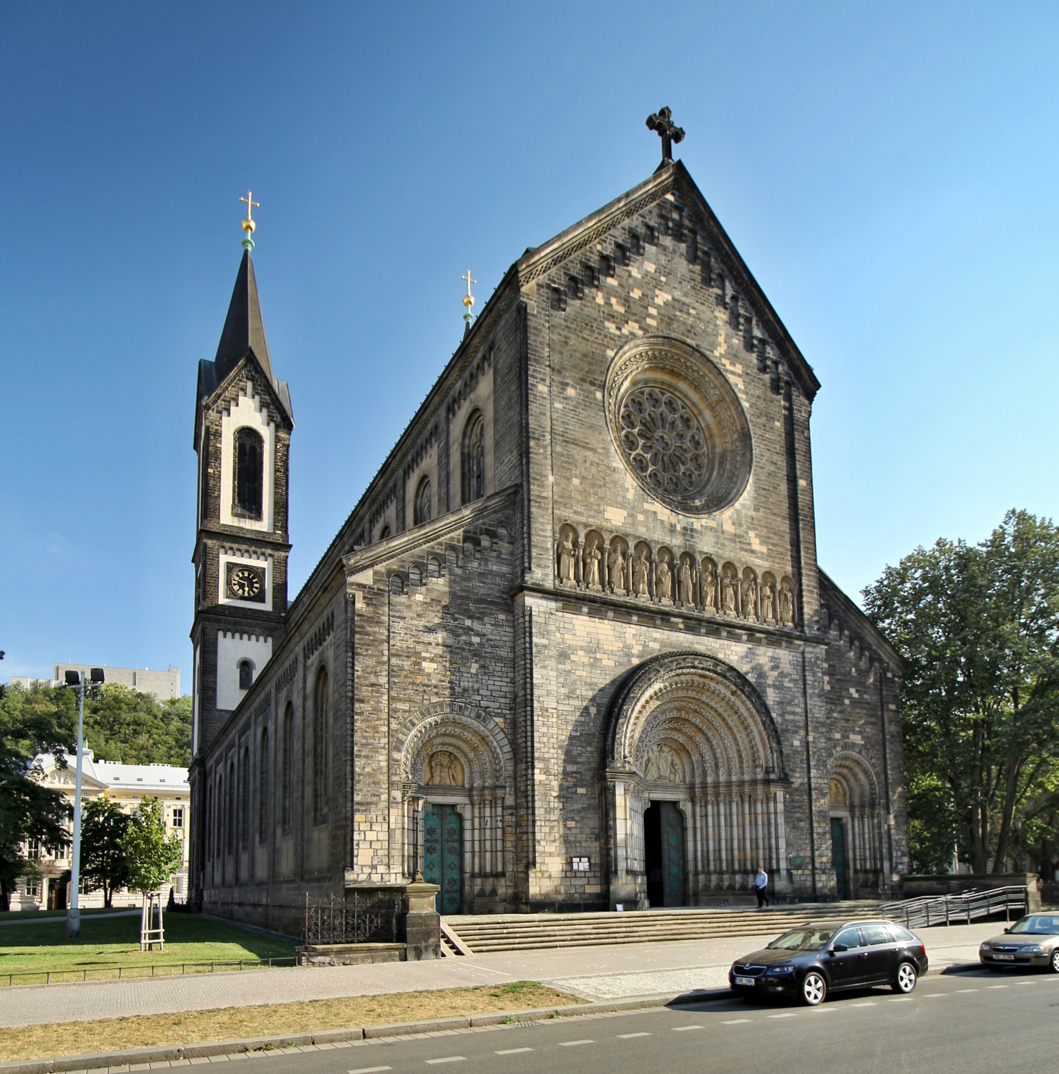 Karlínský kostel svatých Cyrila a Metoděje